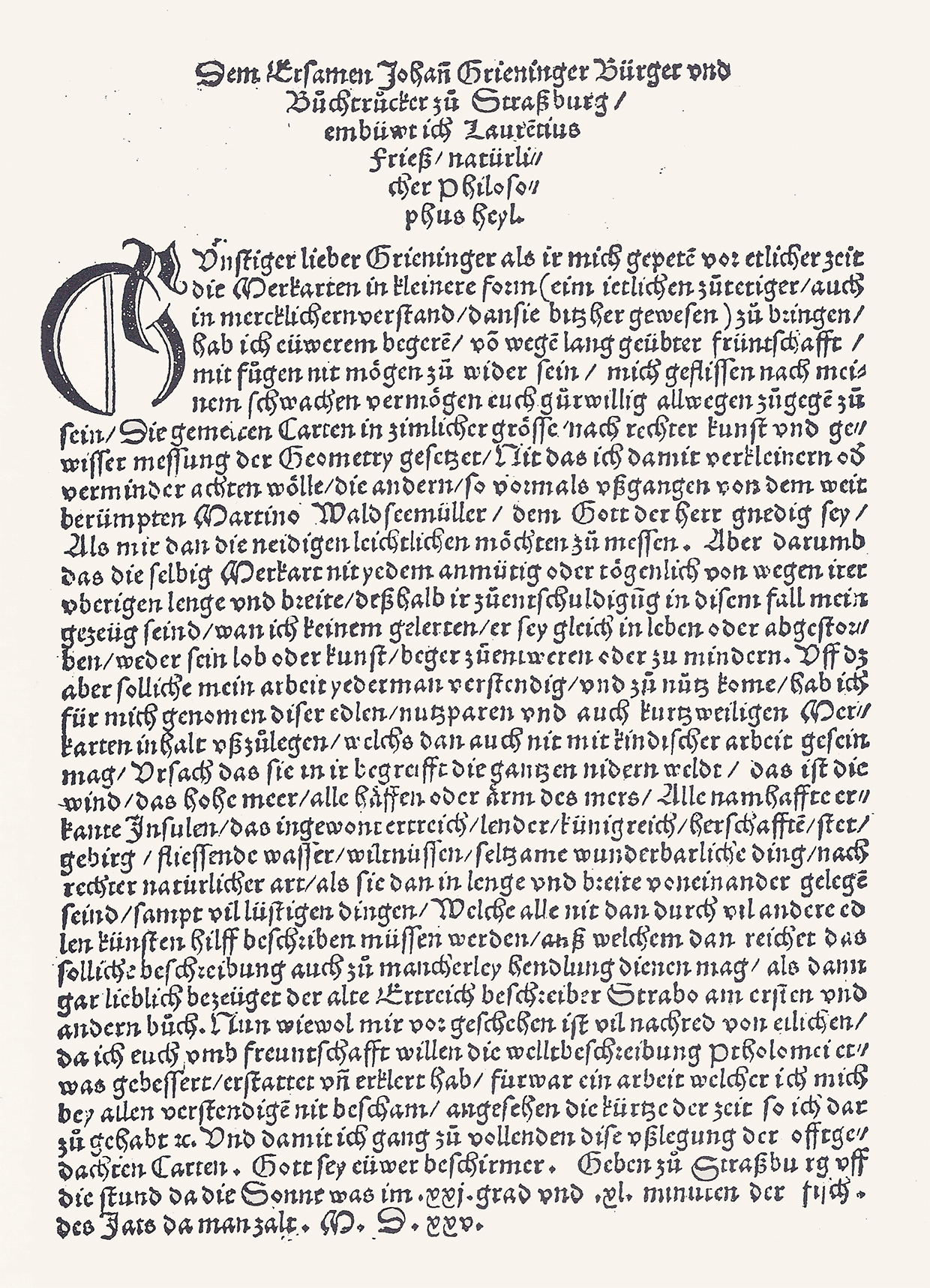 Vorwort von Lorenz Fries in Uslegung der Mercarthen ..., Straßburg: Grüninger, 1527